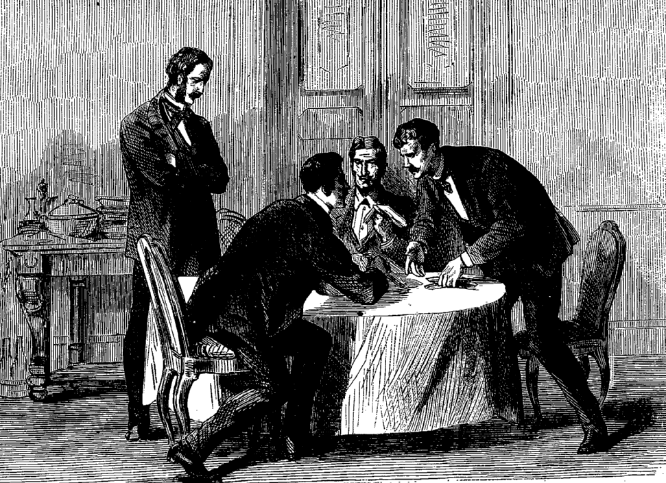 Illustration de Au Bonheur des Dames tirée des Œuvres complètes illustrées de Émile Zola, T1, Fasquelle, 1906, Le service du courrier